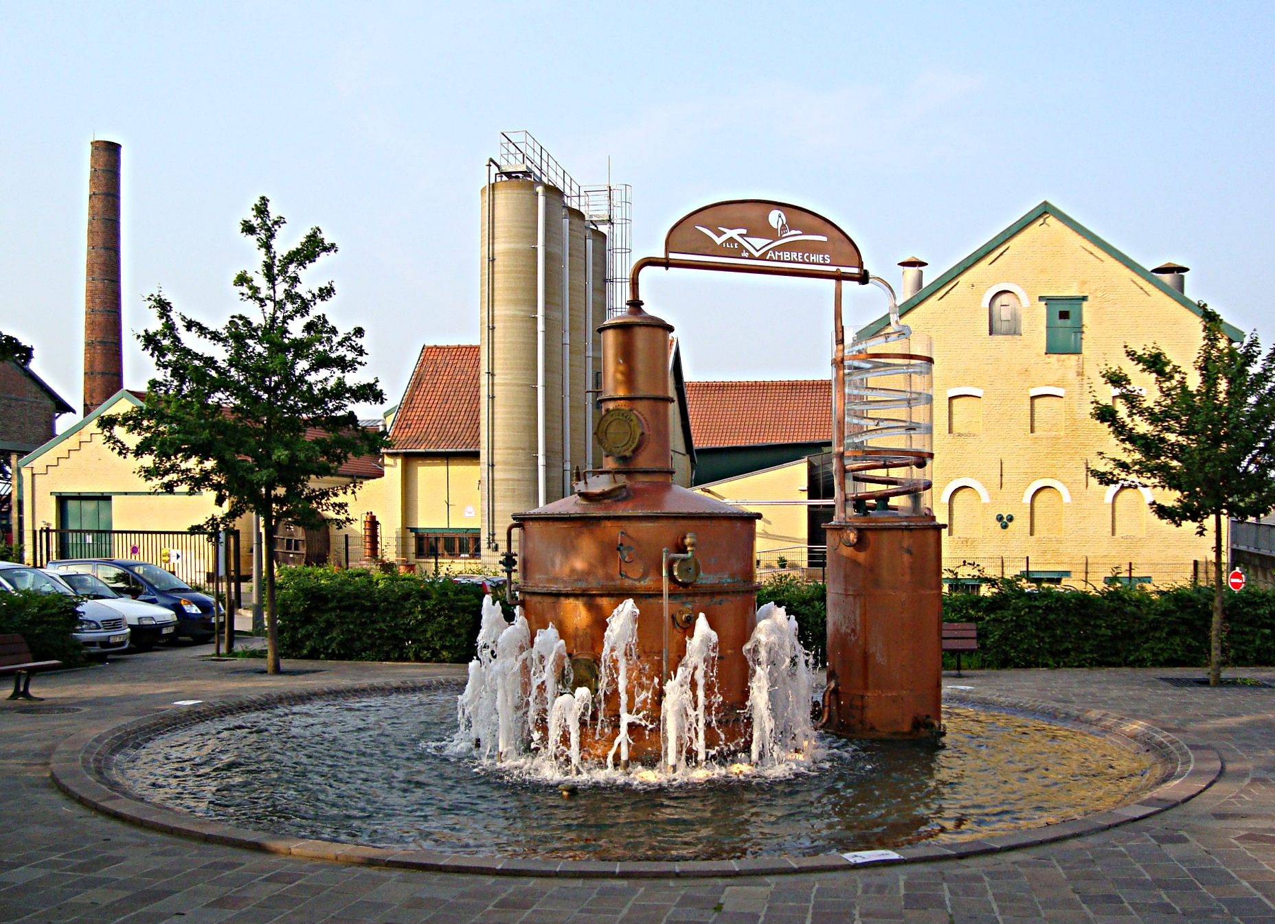 La distillerie de genièvre Claeyssens à Wambrechies (Nord). Construite en 1817, elle est toujours en activité. Inscrite aux monuments historiques en 1999.